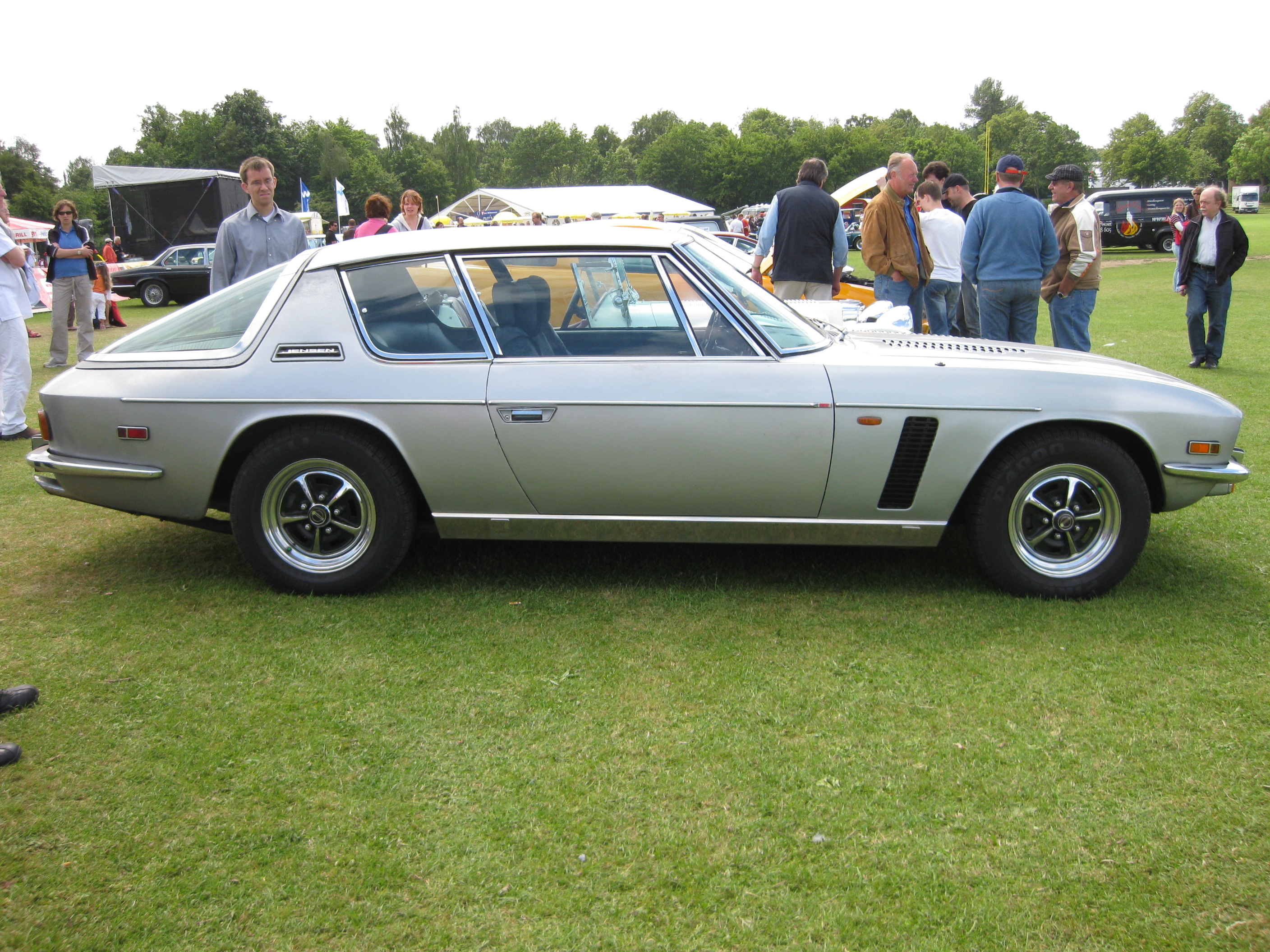 Jensen Interceptor II Seitenansicht